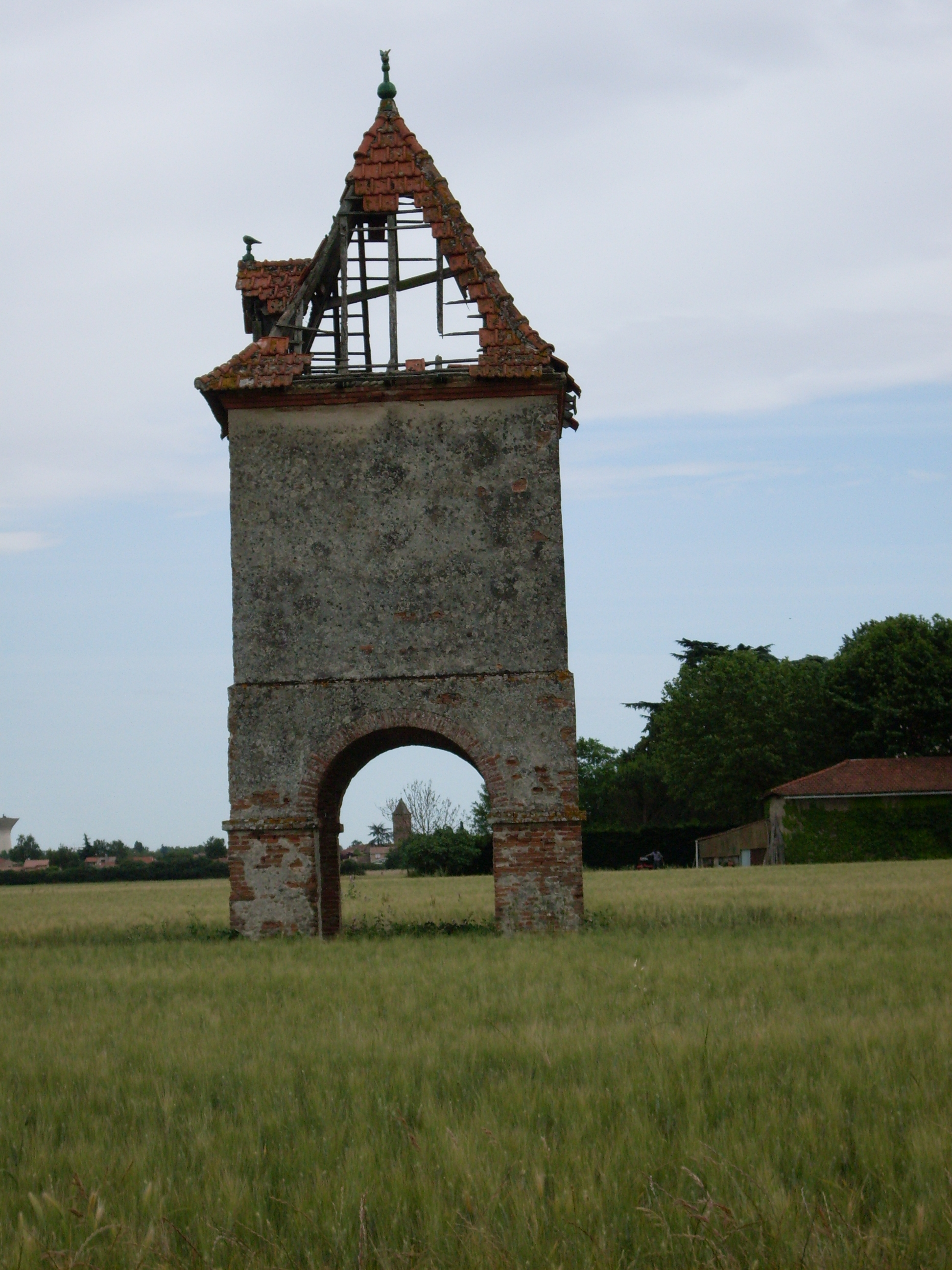 Fenouillet, près de Toulouse (Haute-Garonne) : Pigeonnier sur la route de Gagnac.